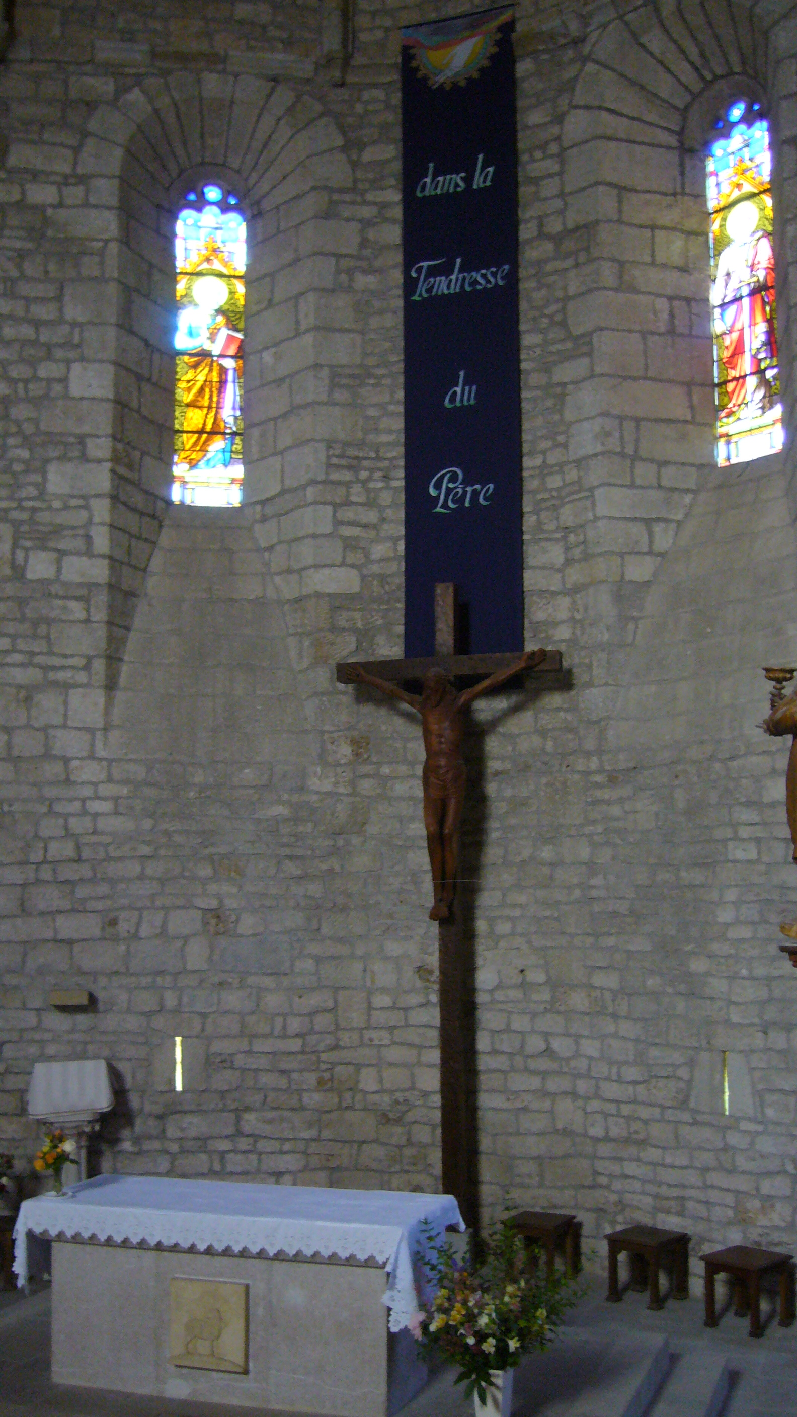 L'église du Monastier (Le Monastir-Pin-Moriès, Lozère, France)